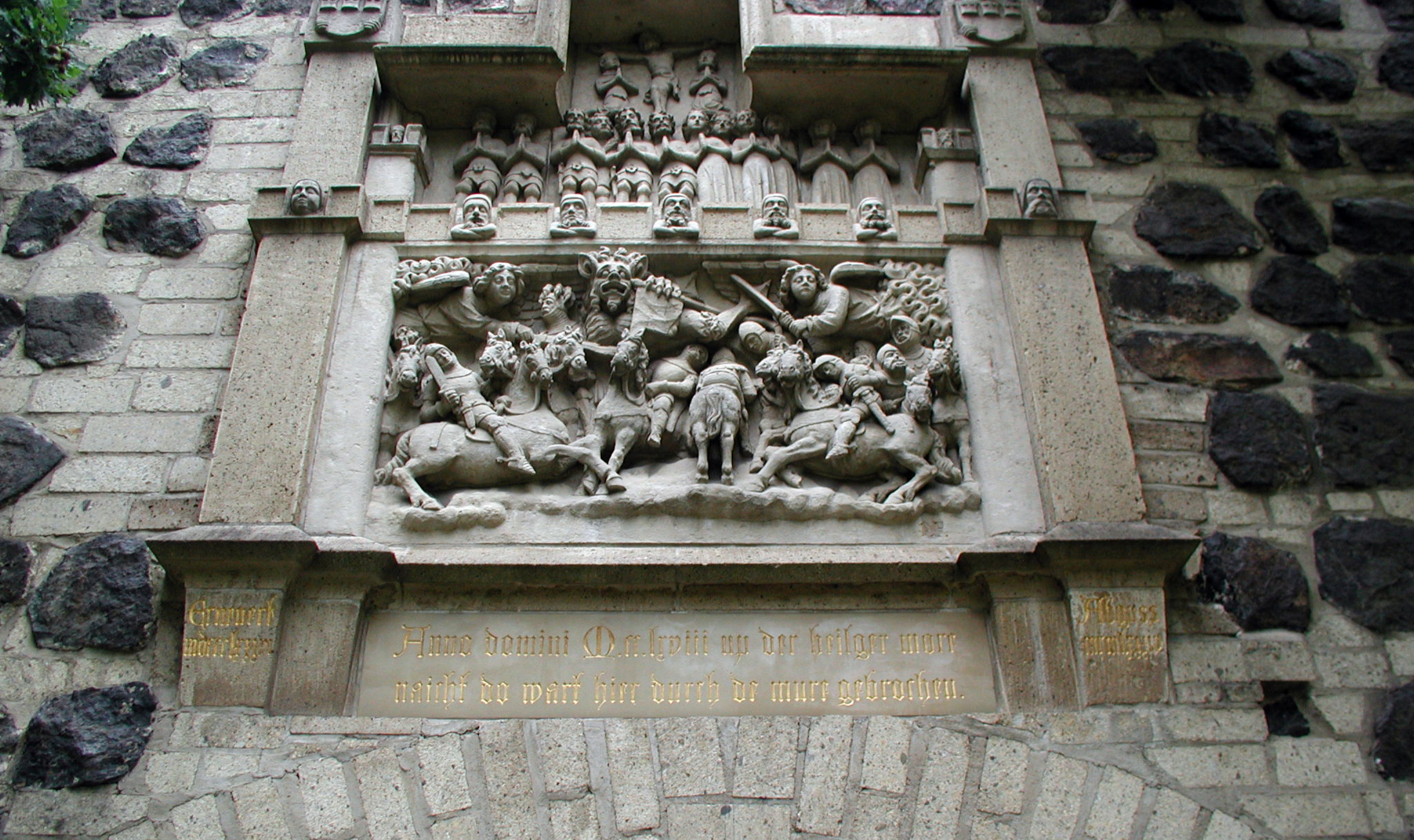 Köln-Stadtmauer, Prinzengardeweg